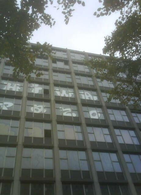 Slooprijp Wibauthuis aan de Wibautstraat, Amsterdam